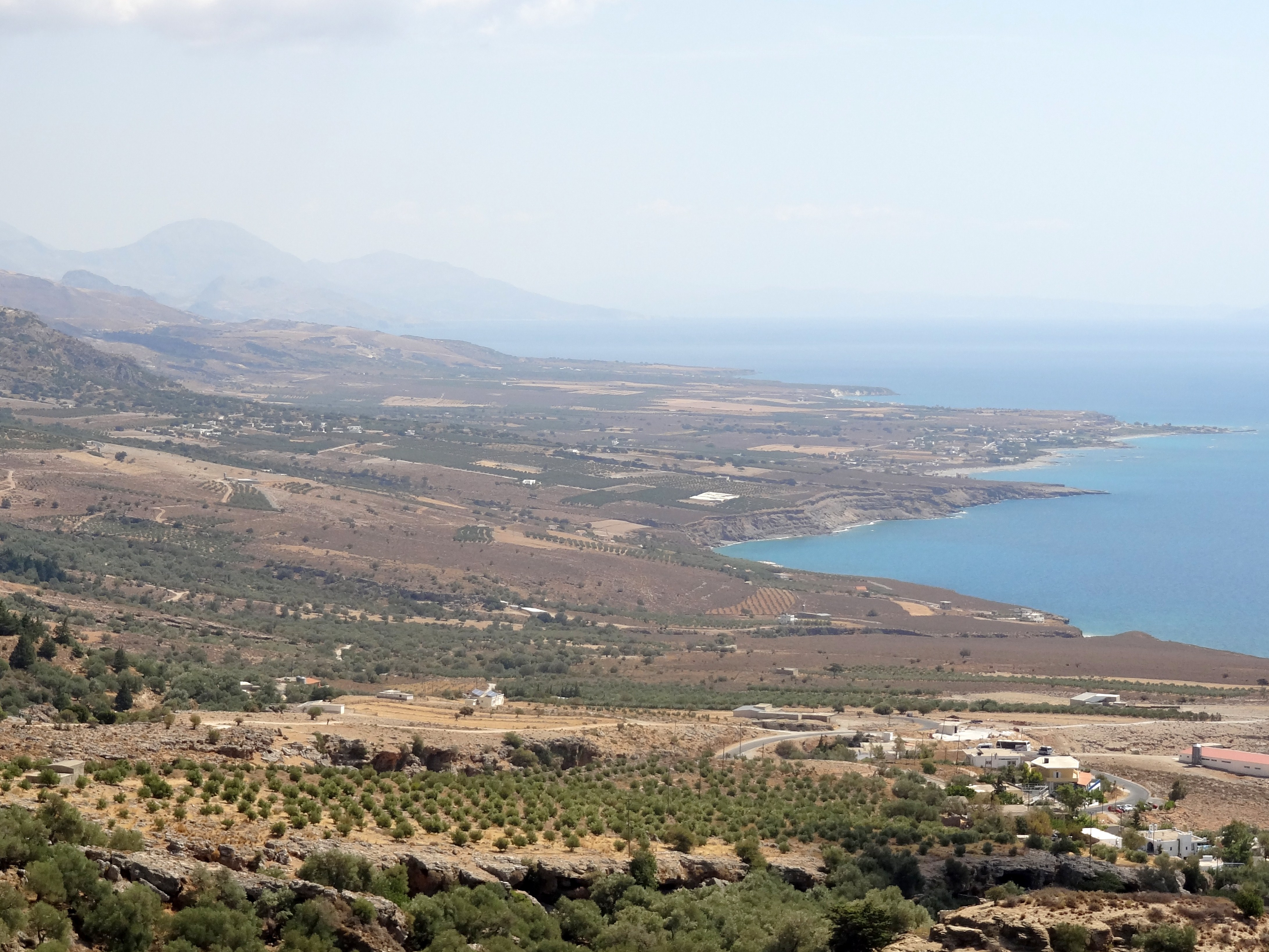 Küstenebene bei Frangokastello, Gemeinde Sfakia, Regionalbezirk Chania, Kreta, Griechenland